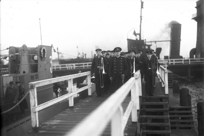 Kiel, Indienststellung U-36 Indienststellung G.559/U 36 am 14.12.1936